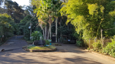 O Parque Ecológico de São Carlos, Dr. Antônio Teixeira Vianna esta localizado na Estrada Municipal Guilherme Scatena km 02, bairro do Espraiado ao lado da Universidade Federal de São Carlos (UFSCar).